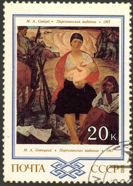 Беларуская (тарашкевіца): Паштовая марка СССР. Міхал Савіцкі «Партызанская мадонна» (1967)